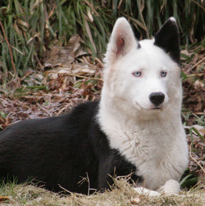 Laika de Yakoutie Femelle, appartenant a Not Fancy Kennel